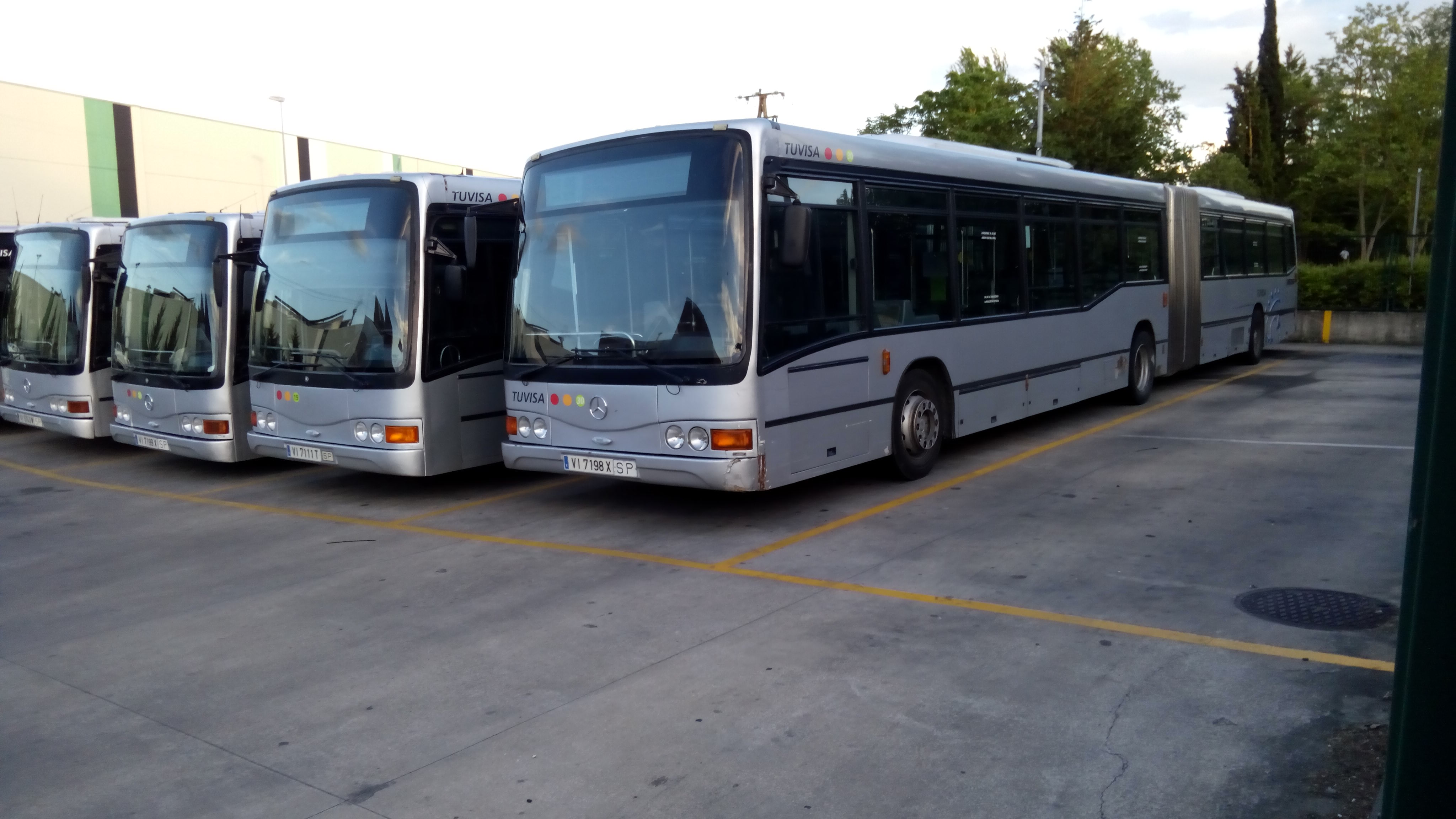 Autobuses viejos de tuvisa